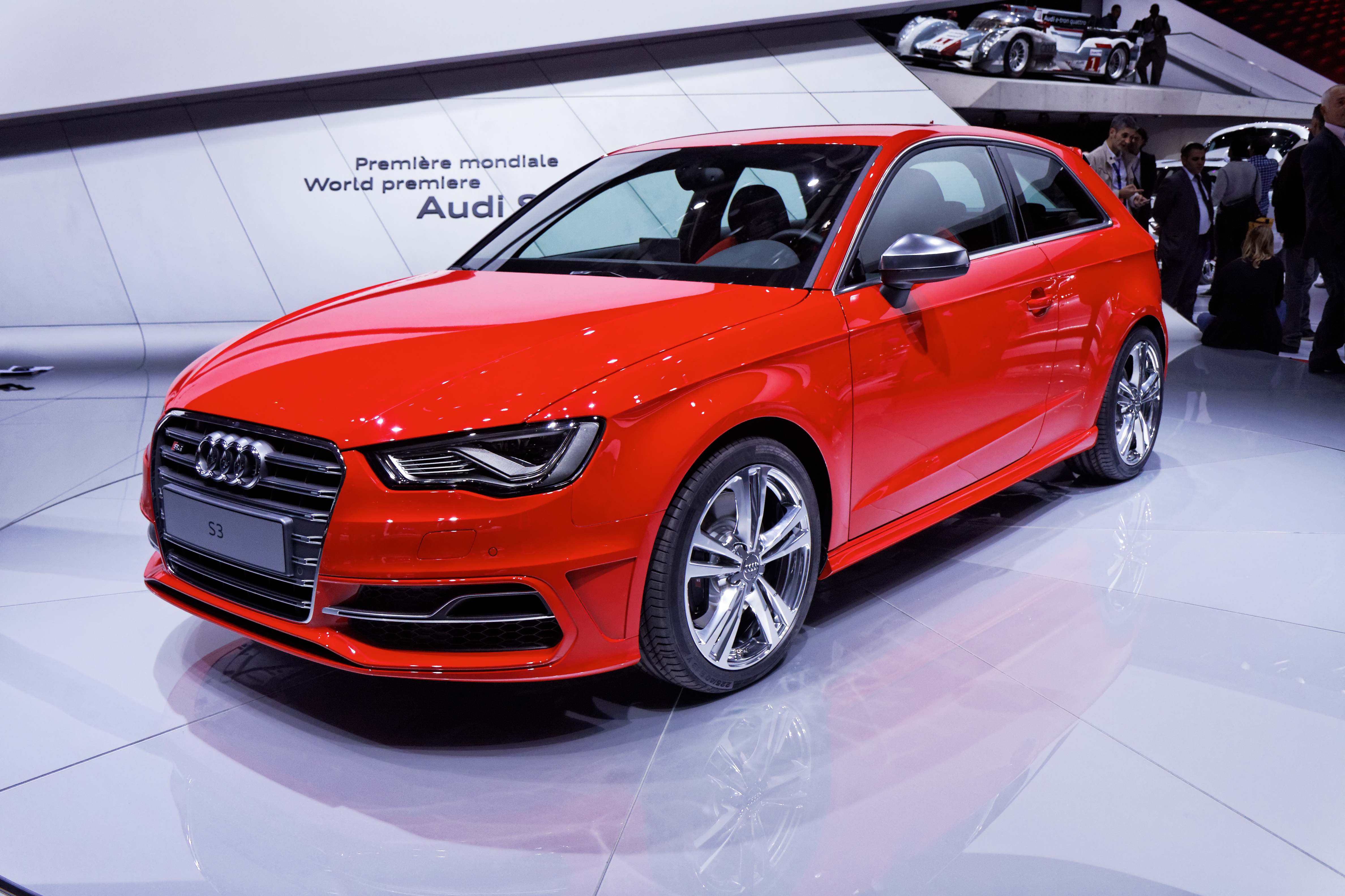 Une Audi S3 présentée lors du Mondial de l'Automobile de Paris 2012.